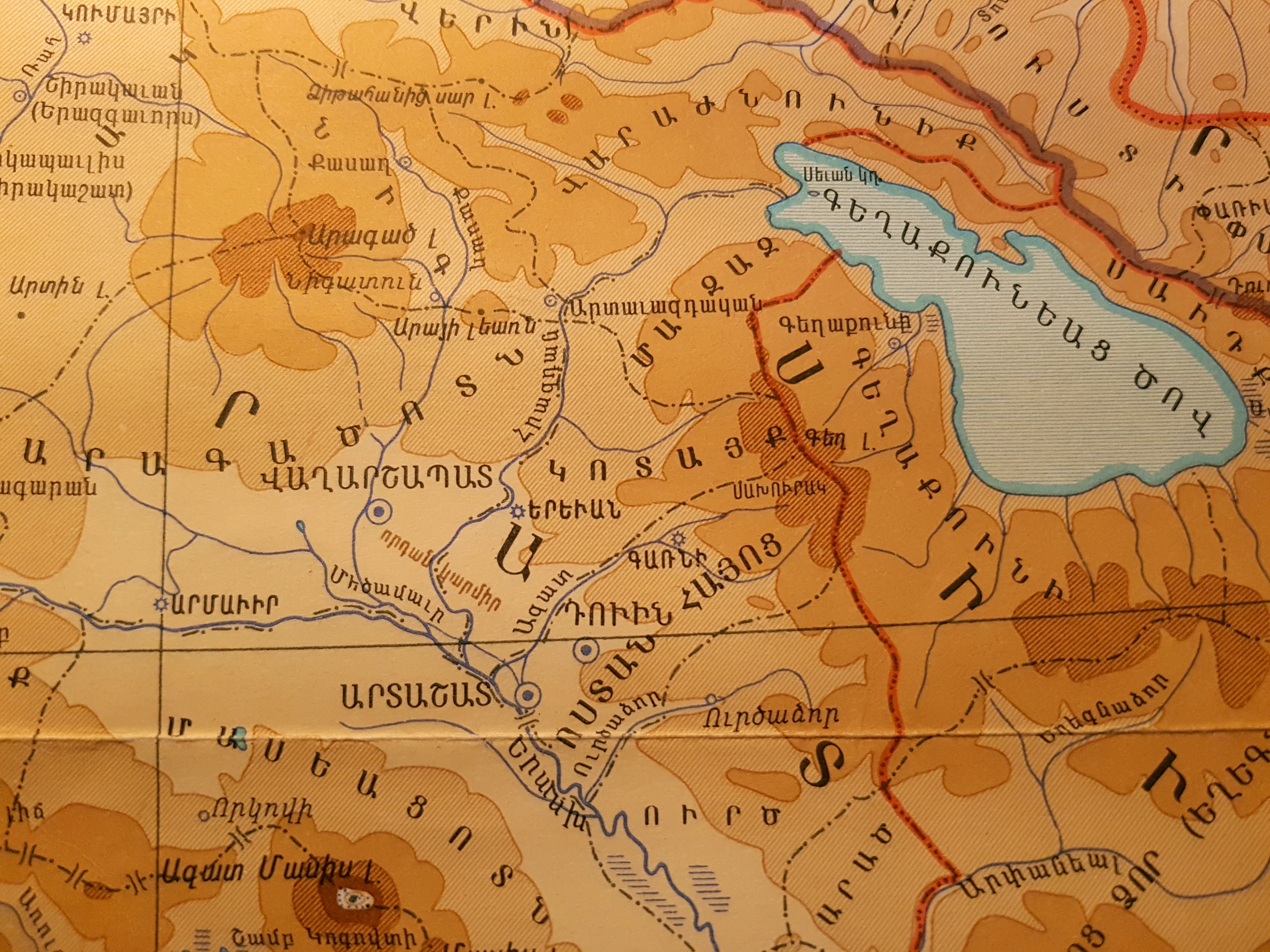 Երևանն ըստ Աշխարհացույցի